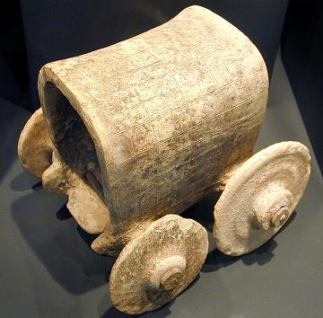 Gedeckter Wagen, Original-Modell, 2.000 v.Chr. Mesopotamien. Badisches Landesmuseum Karlsruhe.